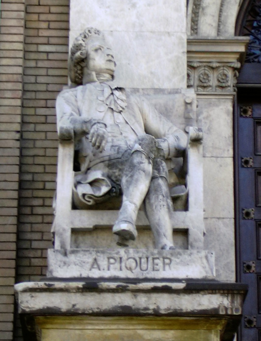 Zaragoza - Antigua Facultad de Medicina - Andrés Piquer - Autor: Jaime Lluch